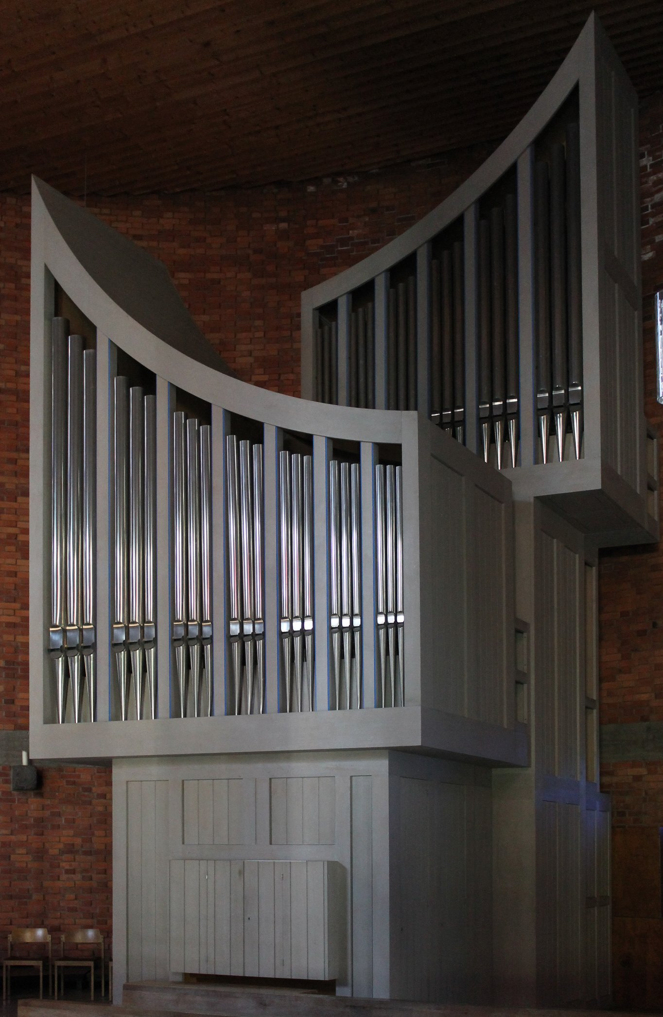 Orgel von St. Nikolaus in München-Hasenbergl (1998, Vleugels, II/28)